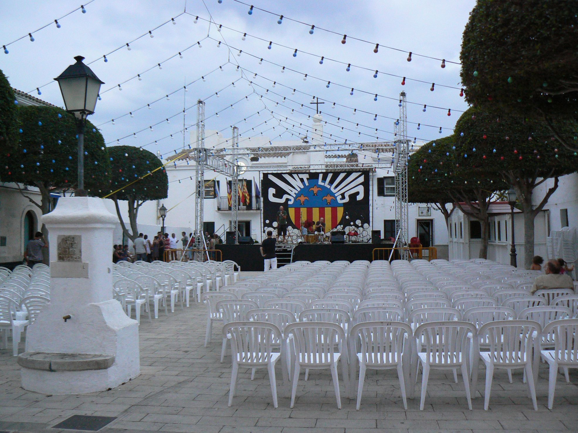 El pla de sa Creu amb l'ajuntament al fons, a l'esquerra, preparant-se per a les festes majors de Sant Lluís (Menorca), que es celebren el dia 25 d'agost. Vista des de l'esglèsia de Sant Lluís.